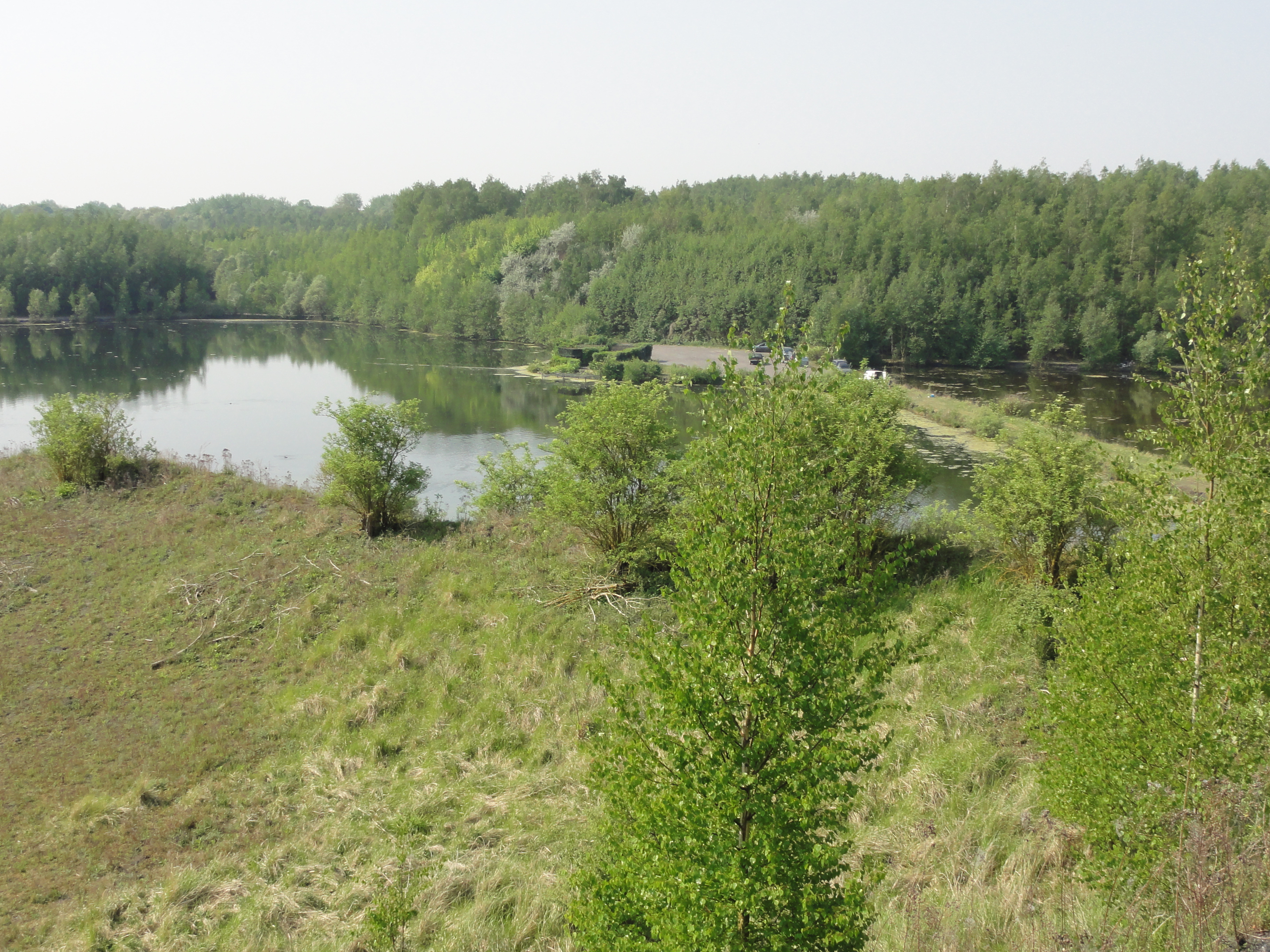 Terril n° 143 dit Germinies Sud, Fosse Barrois, Pecquencourt, Nord, Nord-Pas-de-Calais, France.